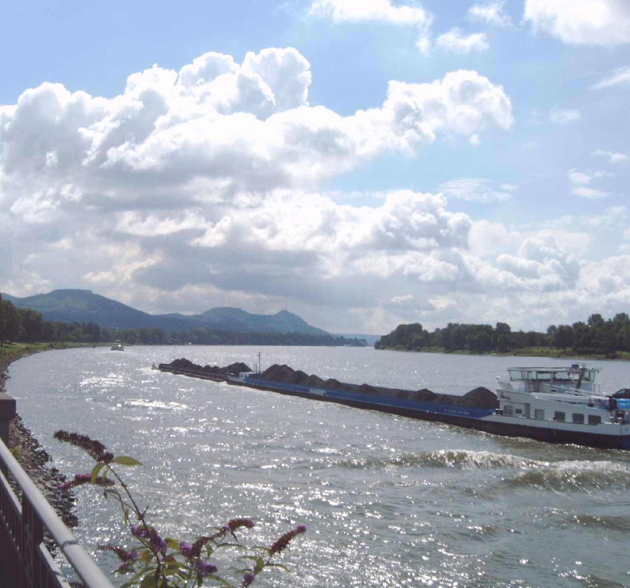 Blick auf das Siebengebirge von Oberkassel (Bonn) aus